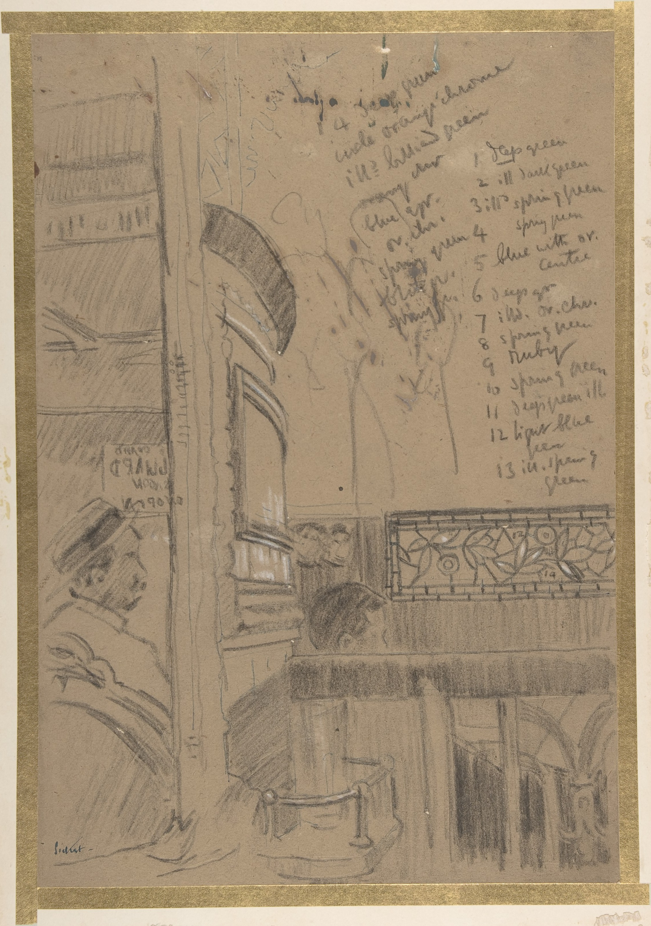 Drawing; Drawings